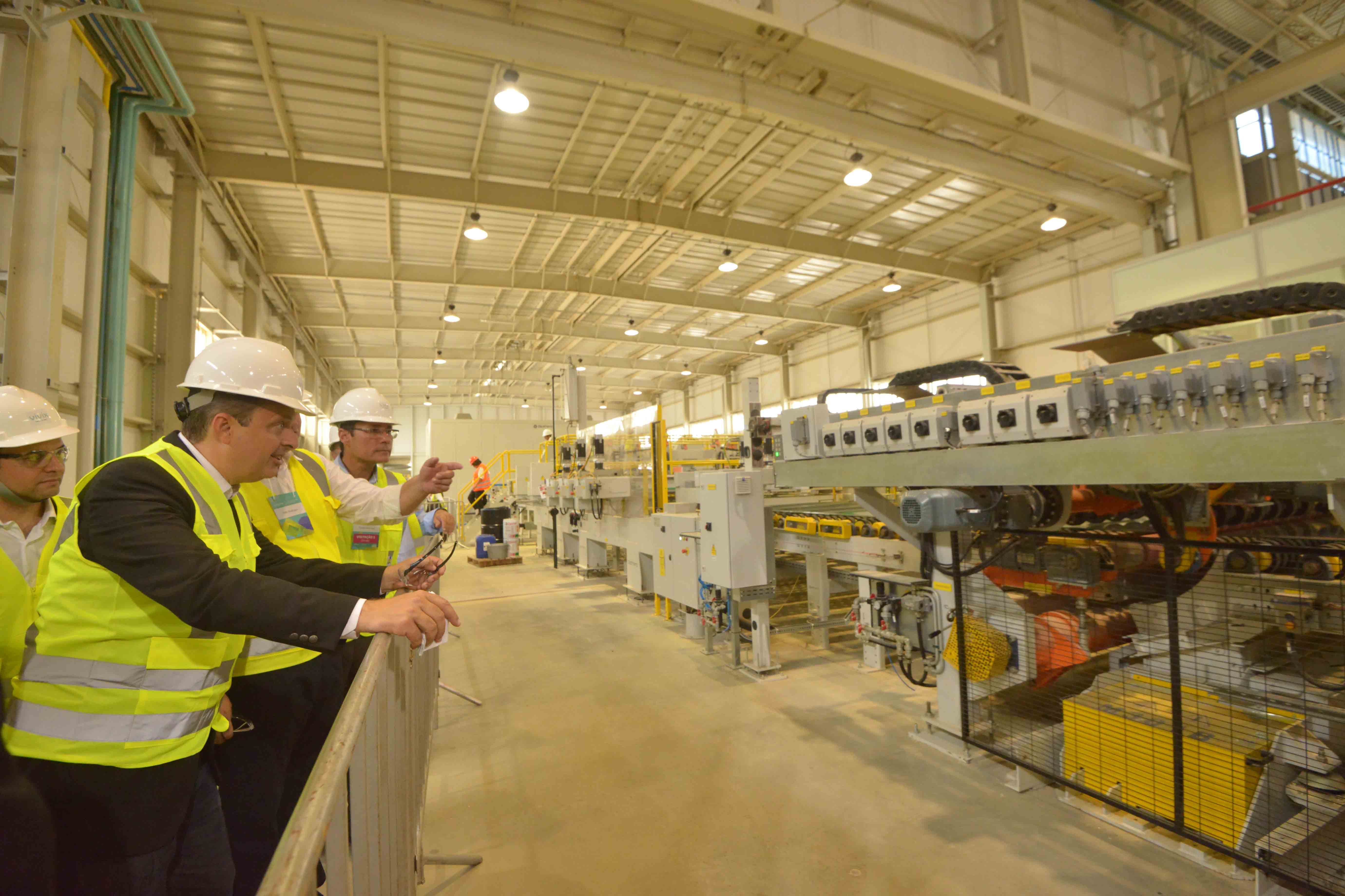 Fábrica de vidros planos - Goiana, Pernambuco, Brasil